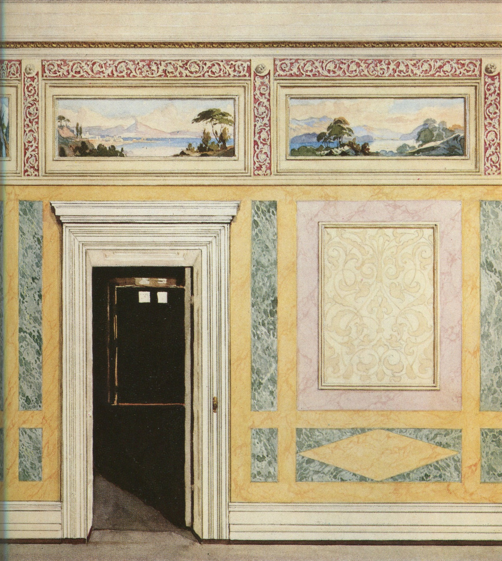 Wandmalerei von Carl Martin Laeisz (1803-1864) im Landhaus des Hamburger Bürgermeisters Schroder in der Eppendorfer Landstraße, nachempfunden einem Aquarell von Hermann Haase (1862-1934).